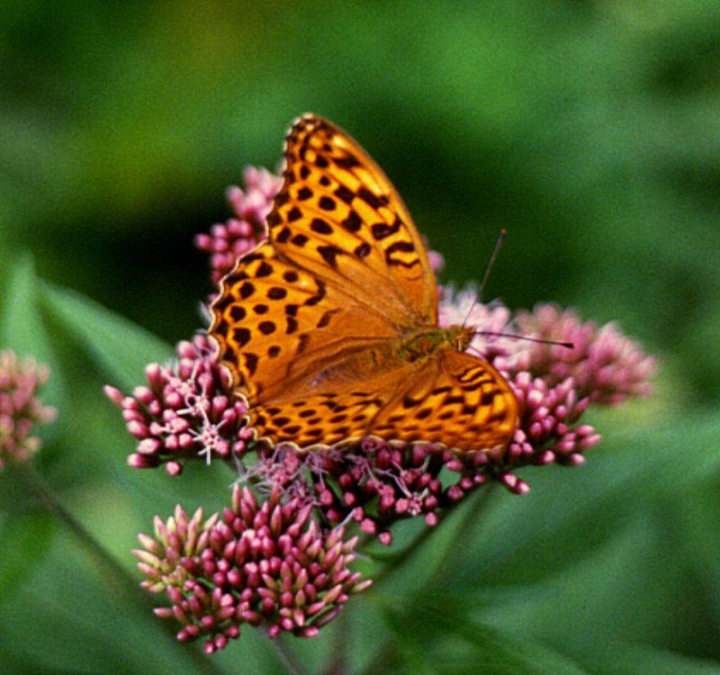 Kaisermantel (Argynnis paphia), Edelfalter (Nymphalidae) - Österreich/Austria/Autriche: Niederösterreich, Erlauftal E Gaming, unter Nestelberg